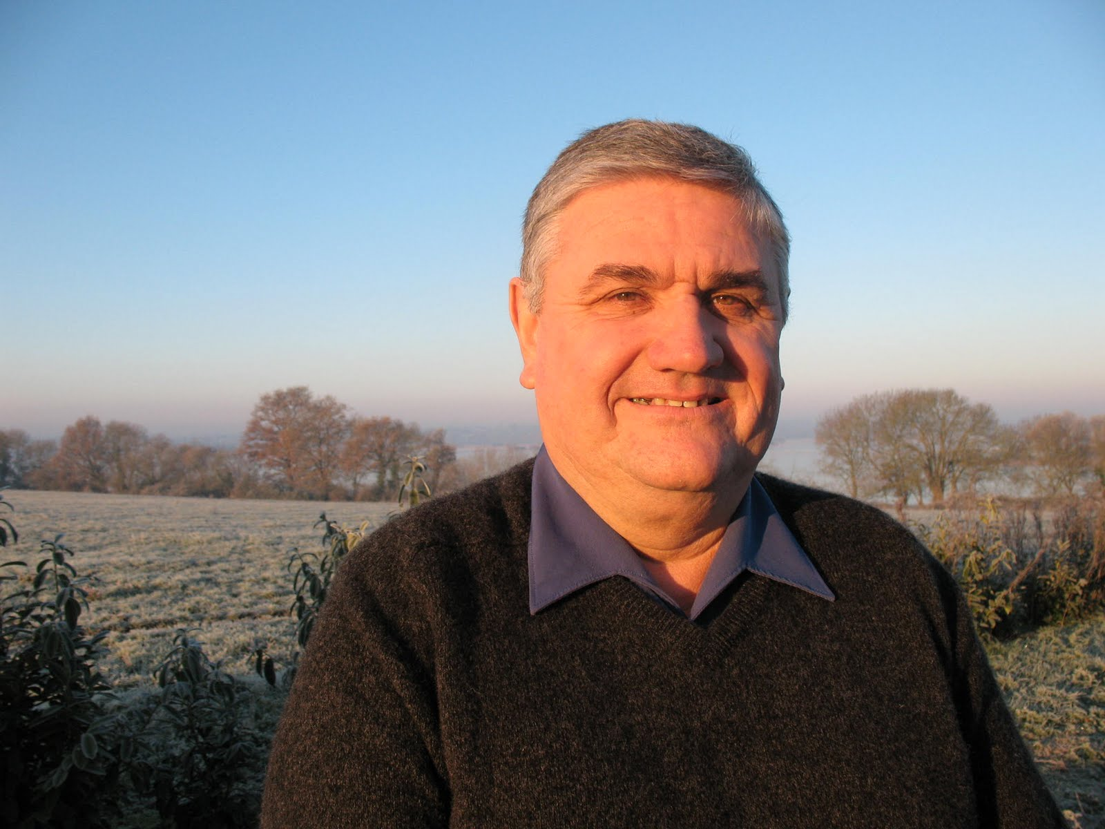 Maire de St Lumine de Coutais